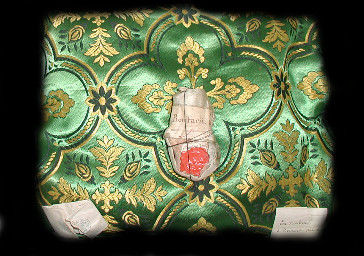 Zelf gemaakt